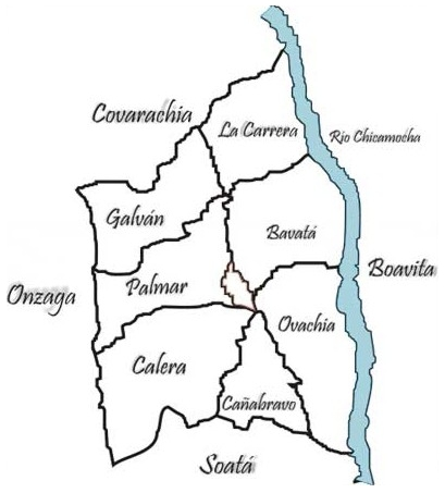 Mapa Politico de Tipacoque creada por